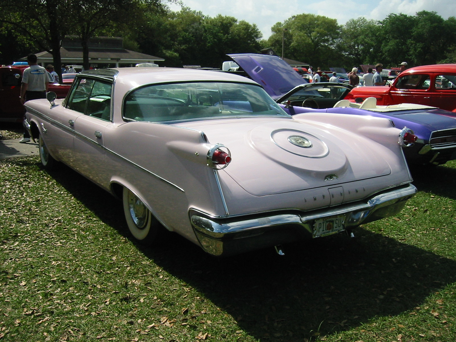 1960 Imperial Crown. Das Relief für das Reserverad im Kofferraumdeckel ist übrigens reine Dekoration. Dieses Ornament wird despektierlich auch "Schwiegermuttersitz" oder "Klobrille" genannt. Ort: USA/Florida/Palm Beach